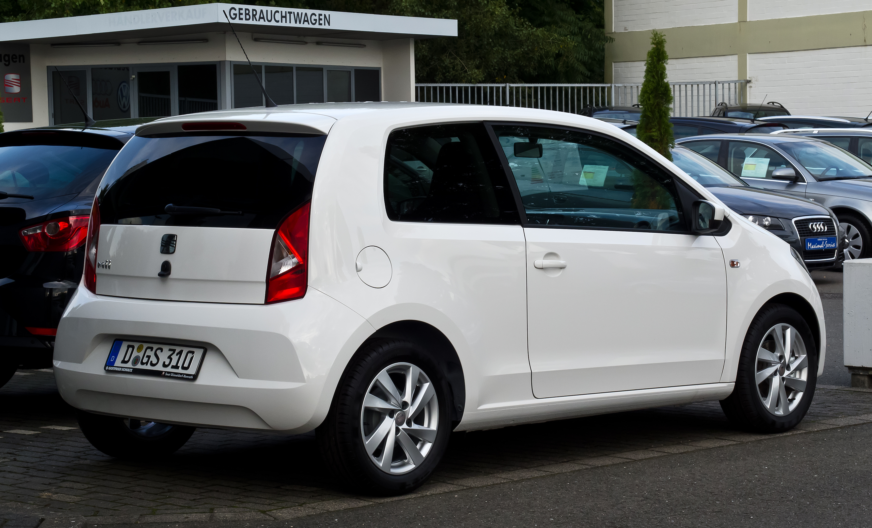 Seat Mii 1.0 Style